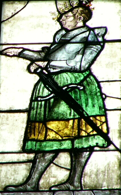 Ausschnitt aus dem Markgrafenfenster von St. Sebald in Nürnberg: Markgraf Johann